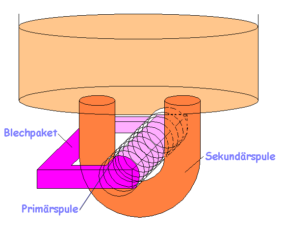 Schema Induktor Gieß-/Rinnenofen